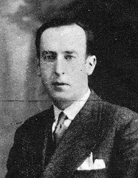 Luís Iglesias Iglesias, fotografía en Vida Gallega 1934